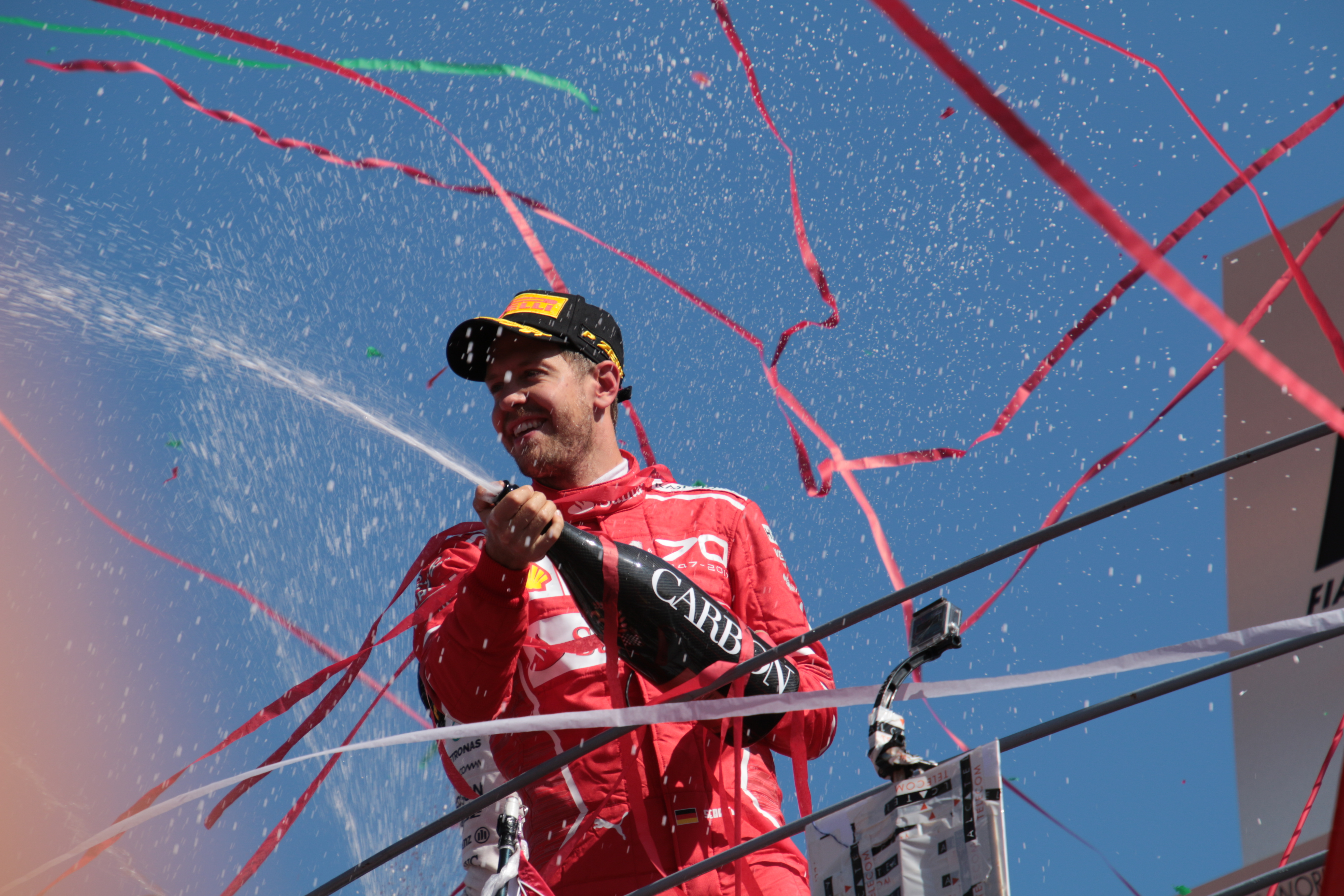 シャンパンファーーーーーイト